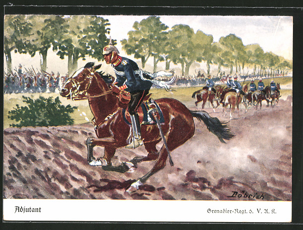 Erich R. Döbrich Kuenstler-AK-Doebrich-Steglitz-Adjutant-Grenadier-Regiment-6-zu-Pferd